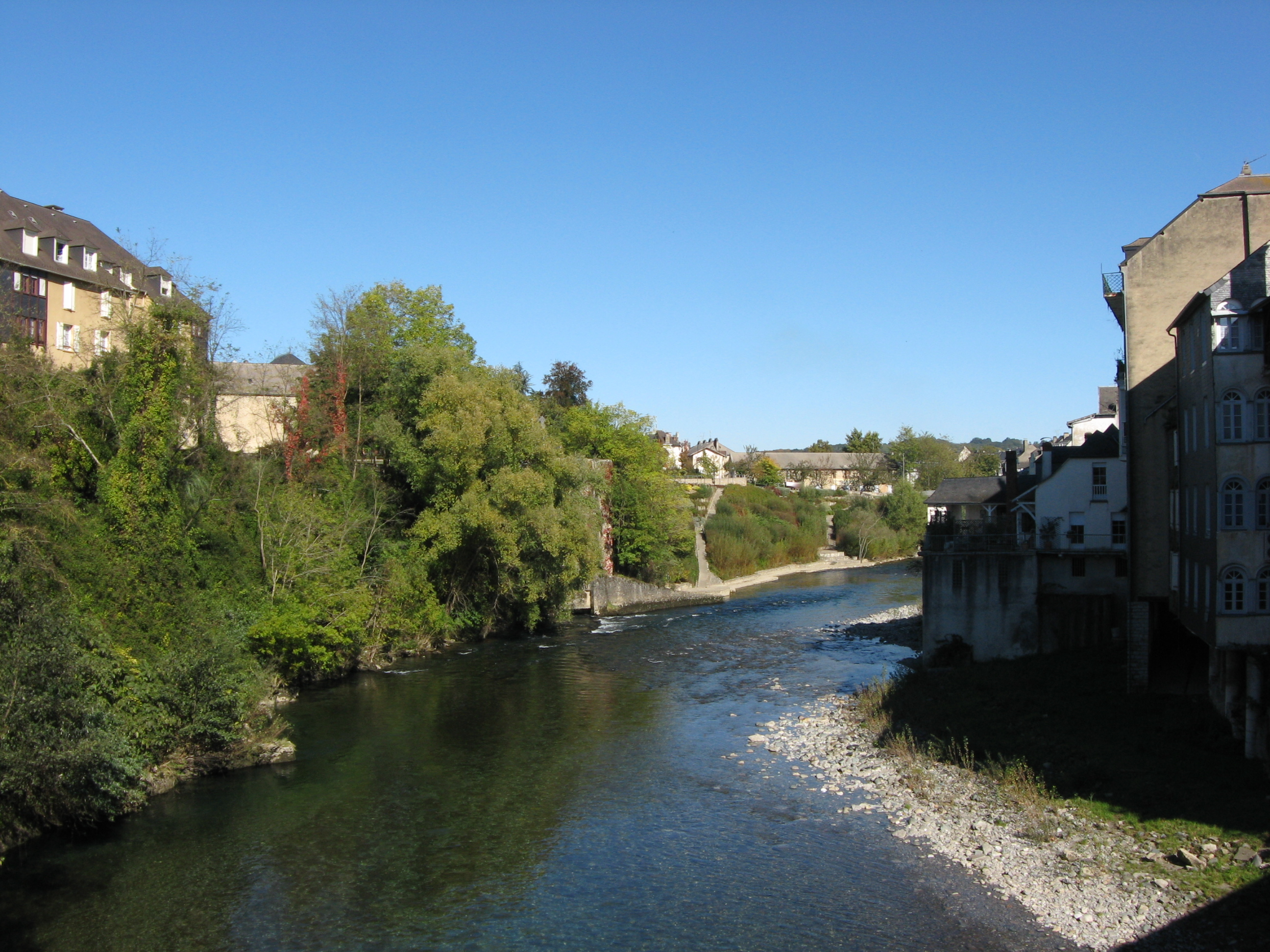 Vue du gave d'Aspe traversant Oloron Sainte Marie (Pyrénées Atlantiques) Pyrénées).